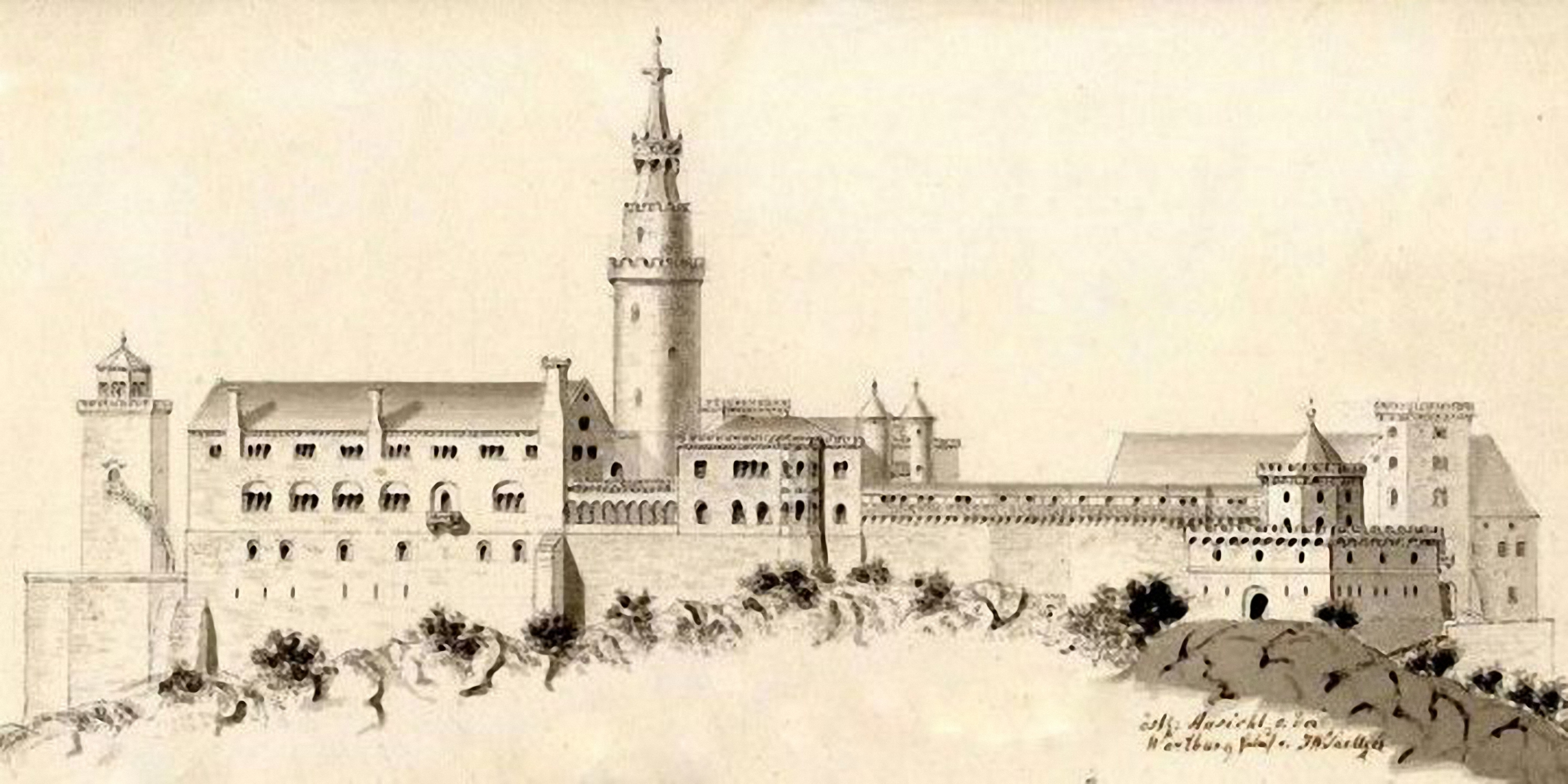 Ausschnitt aus dem Entwurf für die Wiederherstellung der Wartburg, Ostseite und Grundriss